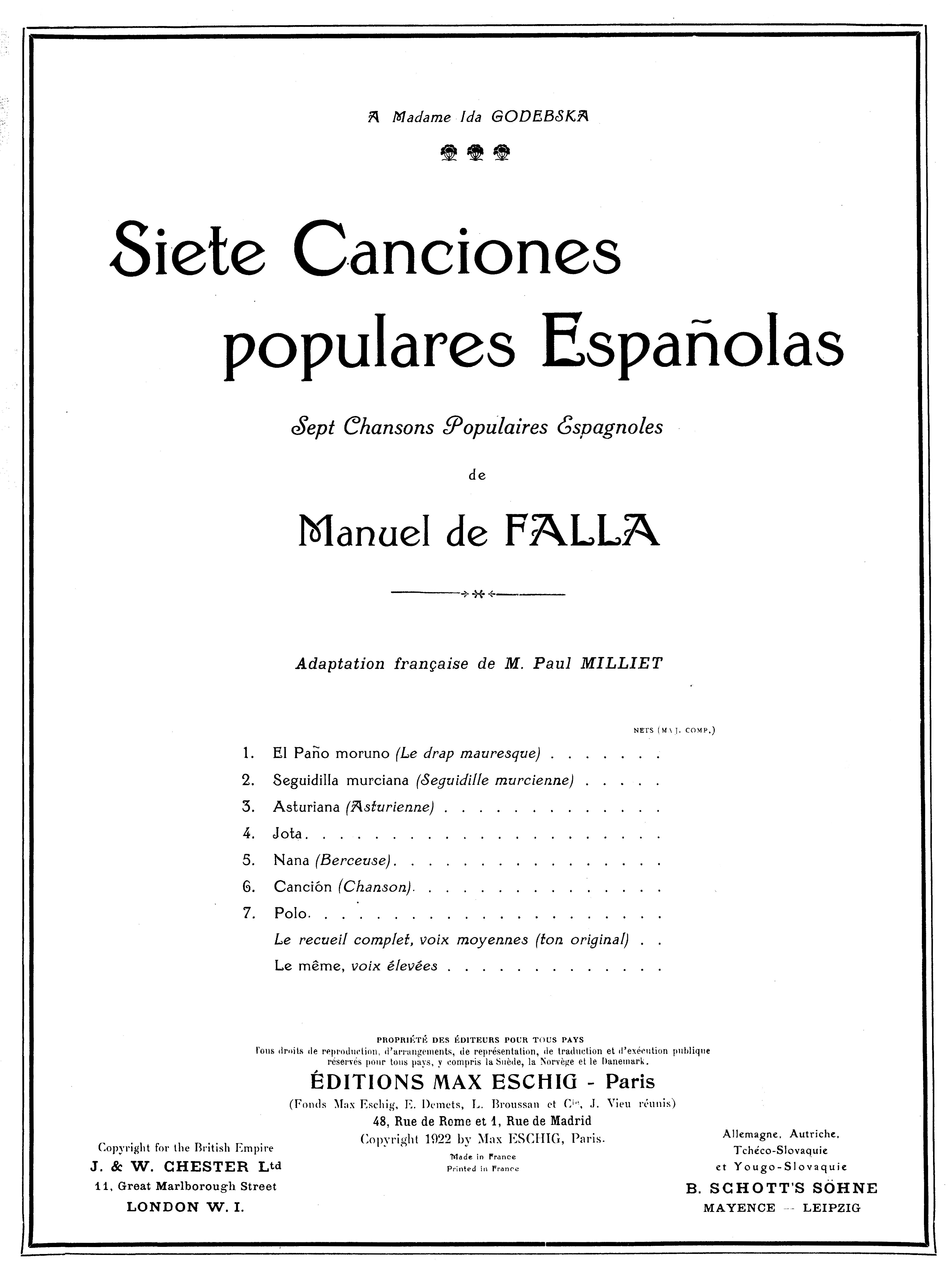 Page de titre de la partition des Sept chansons populaires espagnoles de Manuel de Falla.